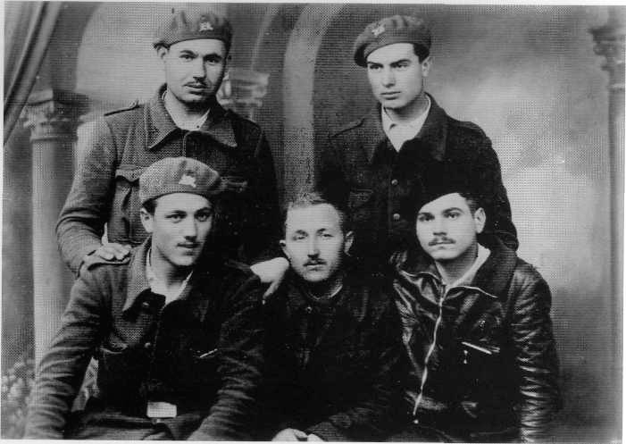 Srpskohrvatski / српскохрватски: Stoje: Lazar Latinović i Branko Krsmanović Sede: Mirko Kovačević, Ratko Pavlović Ćićko i Gerhard Vajs Braco Došli su u Španiju iz Praga, gde su studirali, tokom 1937. godine. Svi osim Lazara Latinovića su poginuli u NOR-u. Krsmanović, Pavlović i Kovačević su postali Narodni heroji Jugoslavije. Latinović je posle rata bio ugledan jugoslovenski diplomata. Od 1999. do svoje smrti 2006. bio je predsednik Udruženja španskih boraca